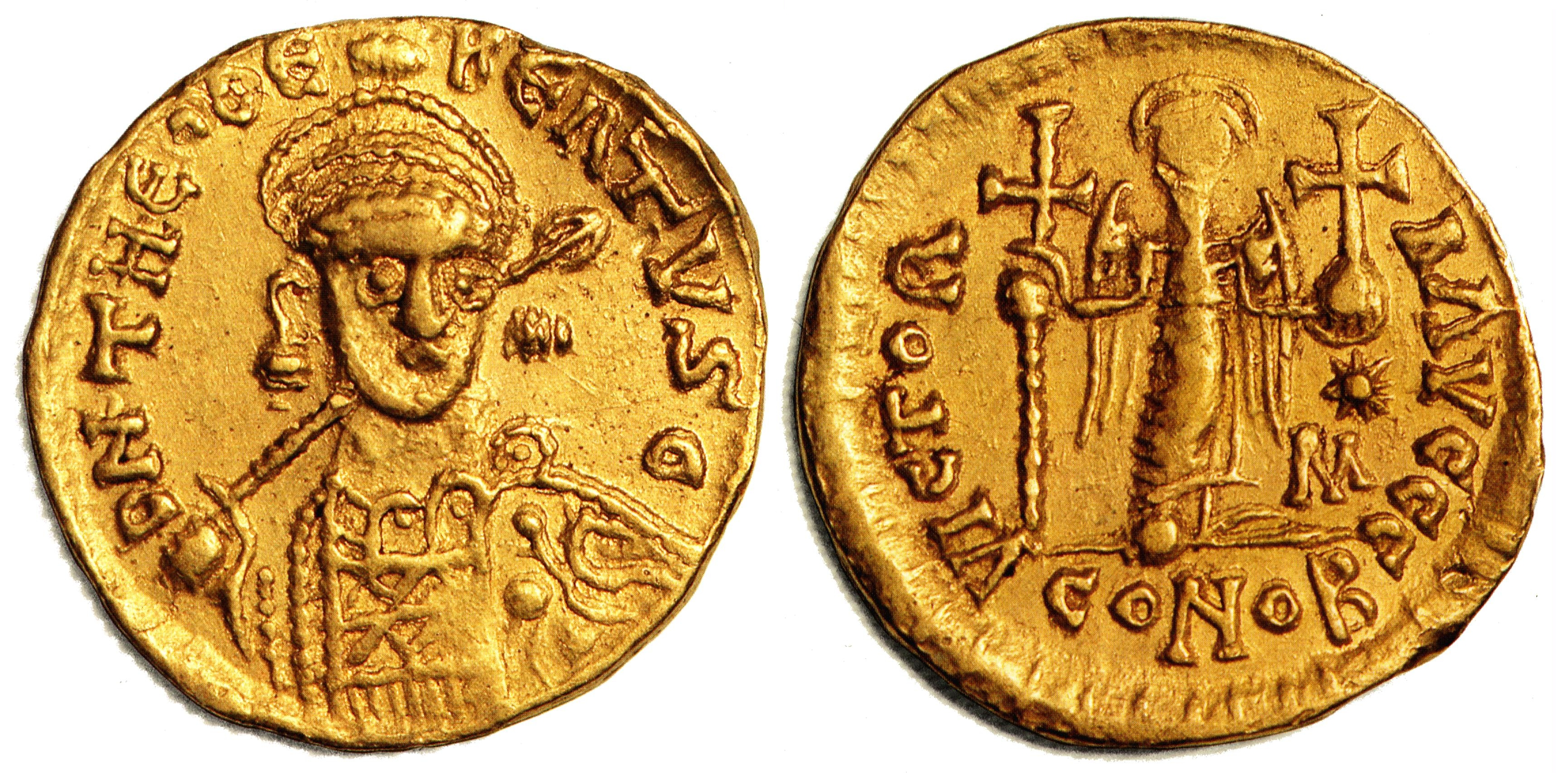 Gold-Solidus des Frankenkönigs Theudebert I. (um 500-548), Münzstätte Mainz, ca. 534, gegenwärtiger Eigentümer Dt. Bundesbank.